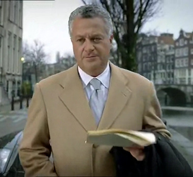 Bram Moszkowicz in commercial